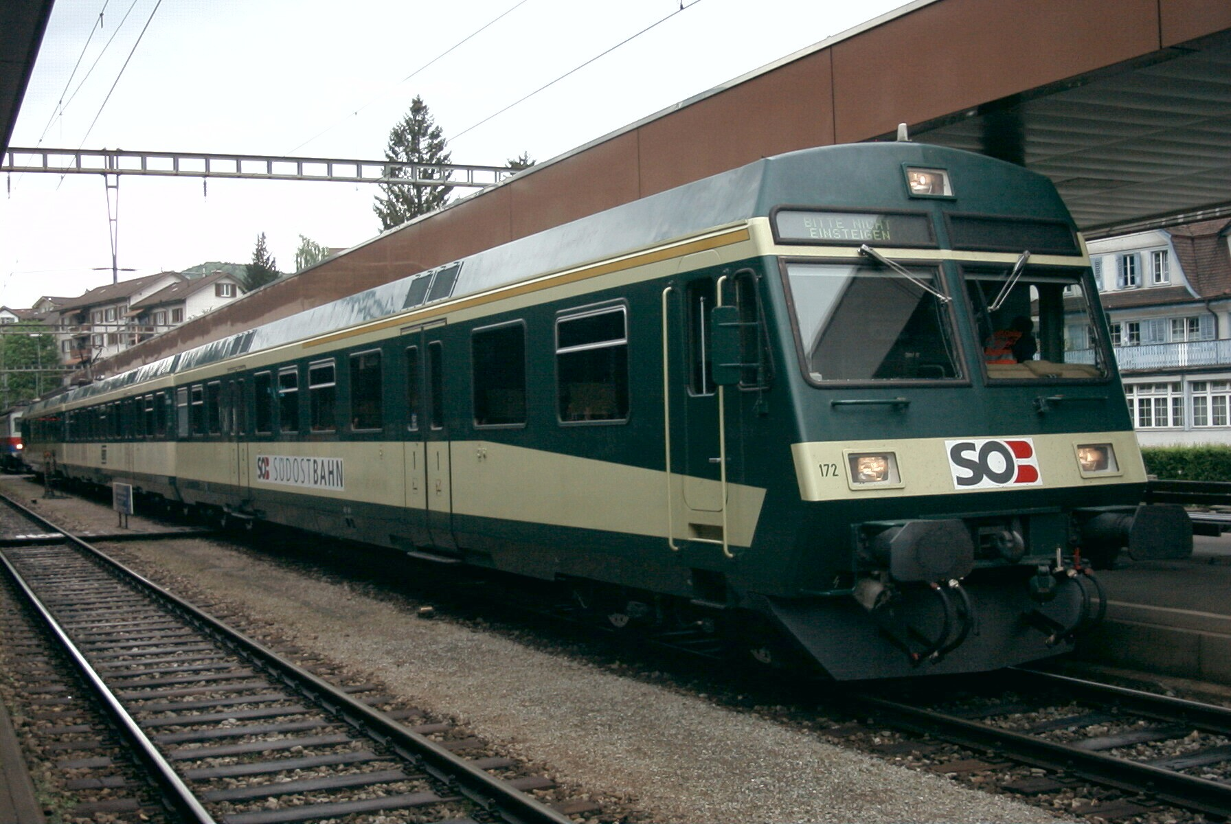 SOB RBDe 566 072 - B 374 - ABt 172 in Herisau, jedes Fahrzeug mit einem anderen Signet. Steuerwagen mit neuem SOB-Signet nach Fusion.